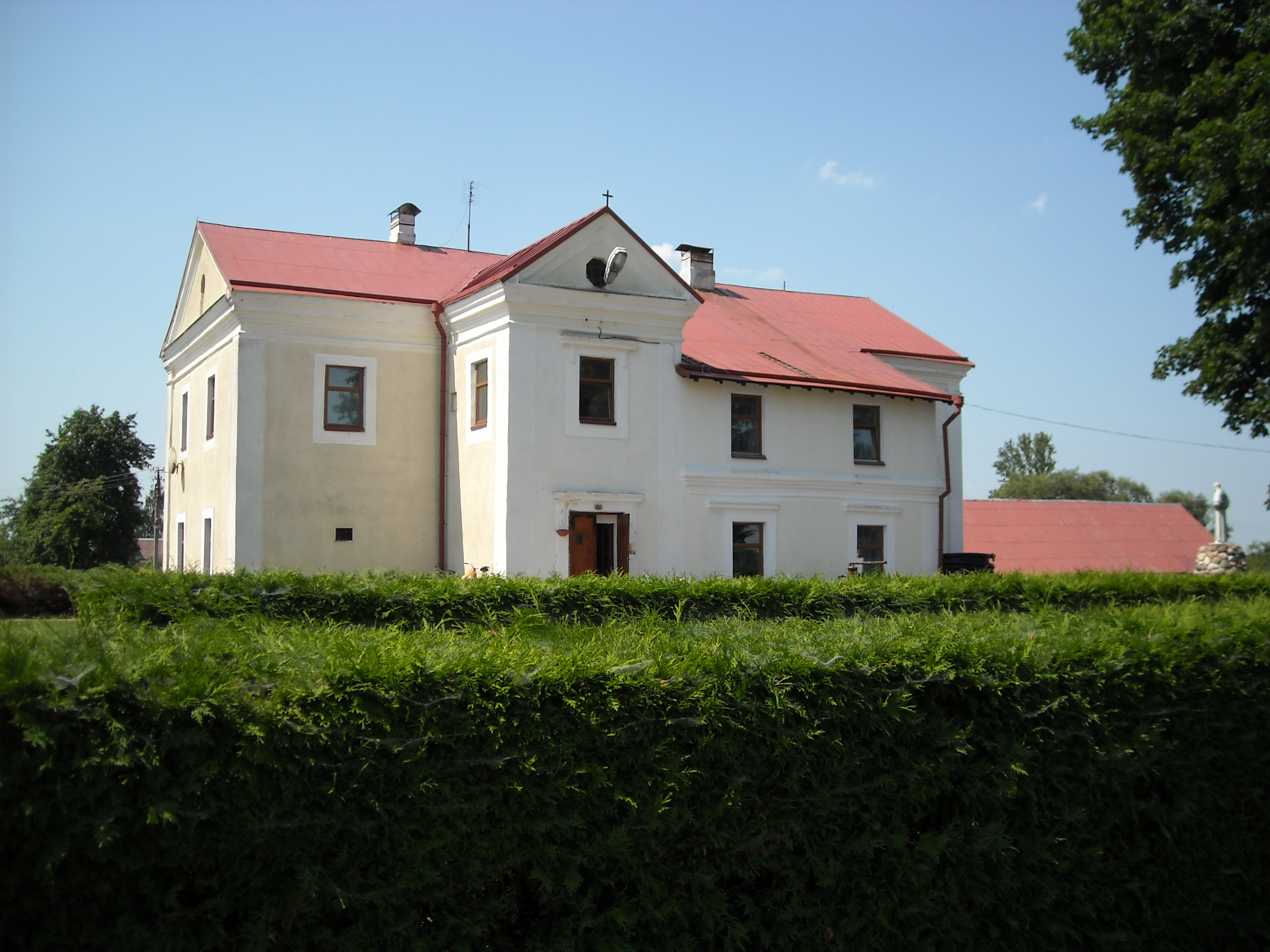 Беларуская (тарашкевіца): Касьцёл Беззаганага Зачацьця Найсьвяцейшай Панны Марыі. в. Удзела This is a photo of Belarusian heritage monument. Reference number: 212Г000417 ( WLM)